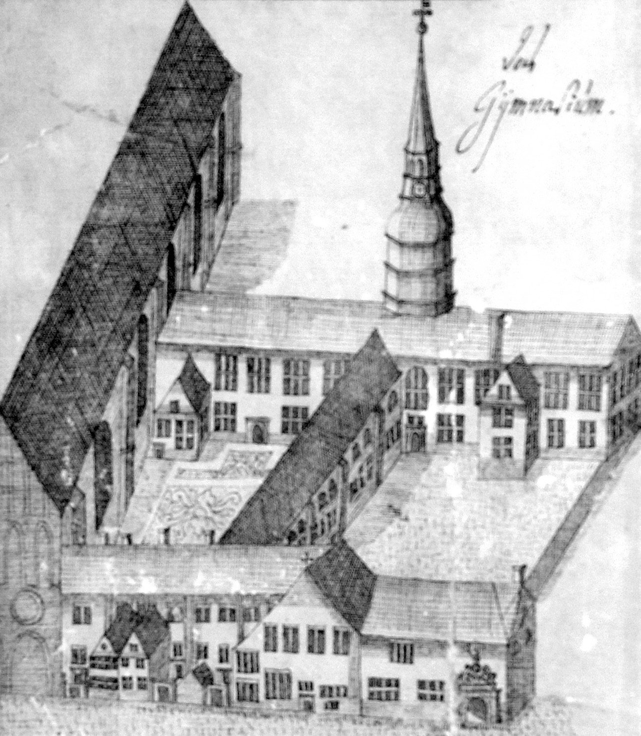 Focke-Museum Bremen: Das alte Gymnasium am Katharinenkloster. Ausschnitt: Plan der Stadt Bremen, 1734. Federzeichnung von Johann Daniel Heinbach